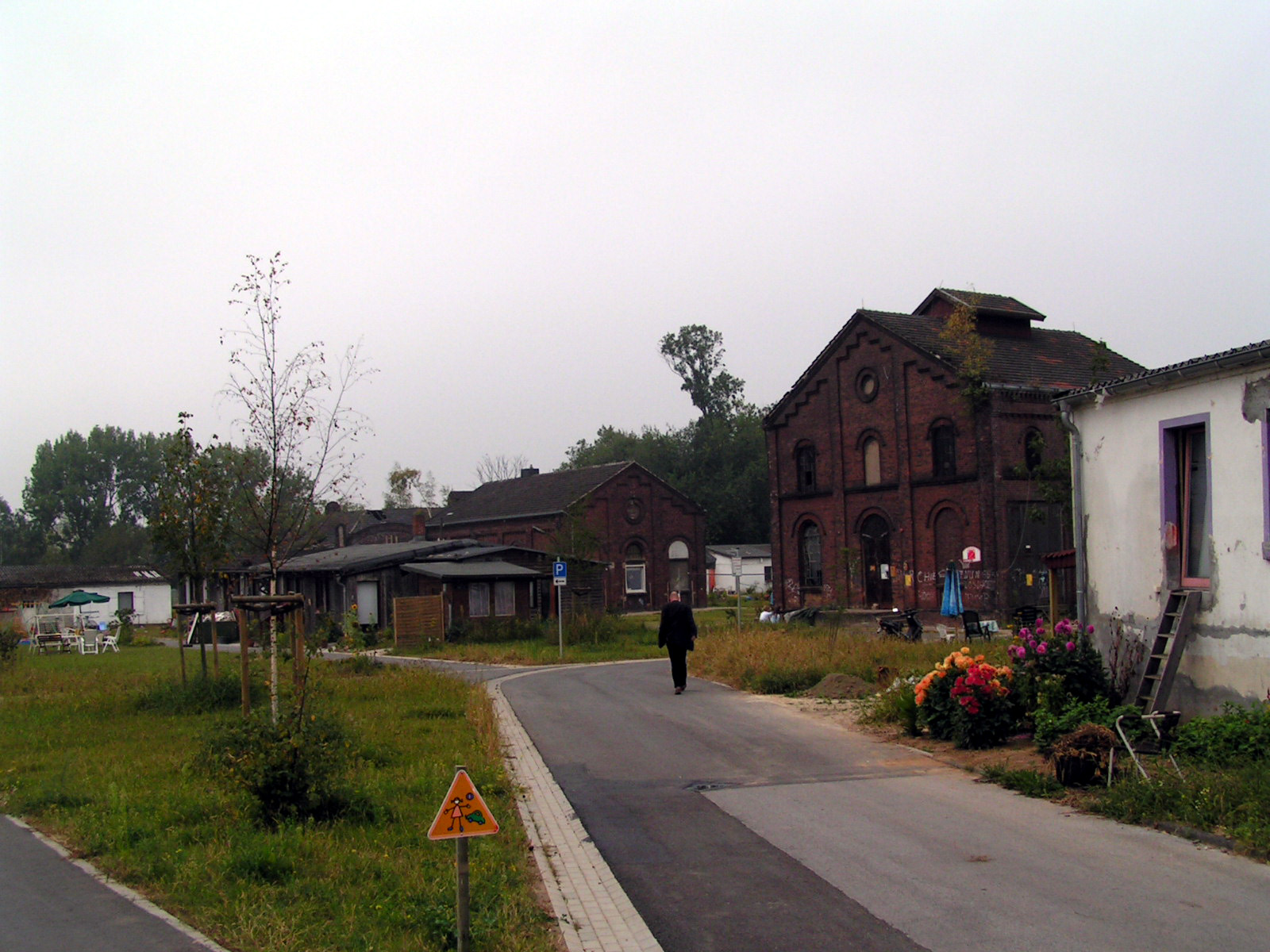 Ehemaliges Zwangsarbeiterlager in Bochum-Gerthe, nun Wohnprojekt und Museum Source: own work Date: Sept 2005, Bochum, Germany Author: Maschinenjunge Licence: GFDL, cc-by 3.0